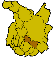 Localisation de la commune de Serravalle Pistoiese à l'intérieur de la province de Pistoia.